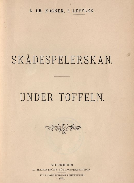 Försättsblad till originalutgåvan av dramerna Skådespelerskan och Under toffeln